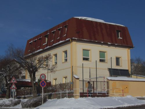 Základní škola Edisonova. Budova pocházející z roku 1883, stav po poslední rekonstrukci v roce 2006.